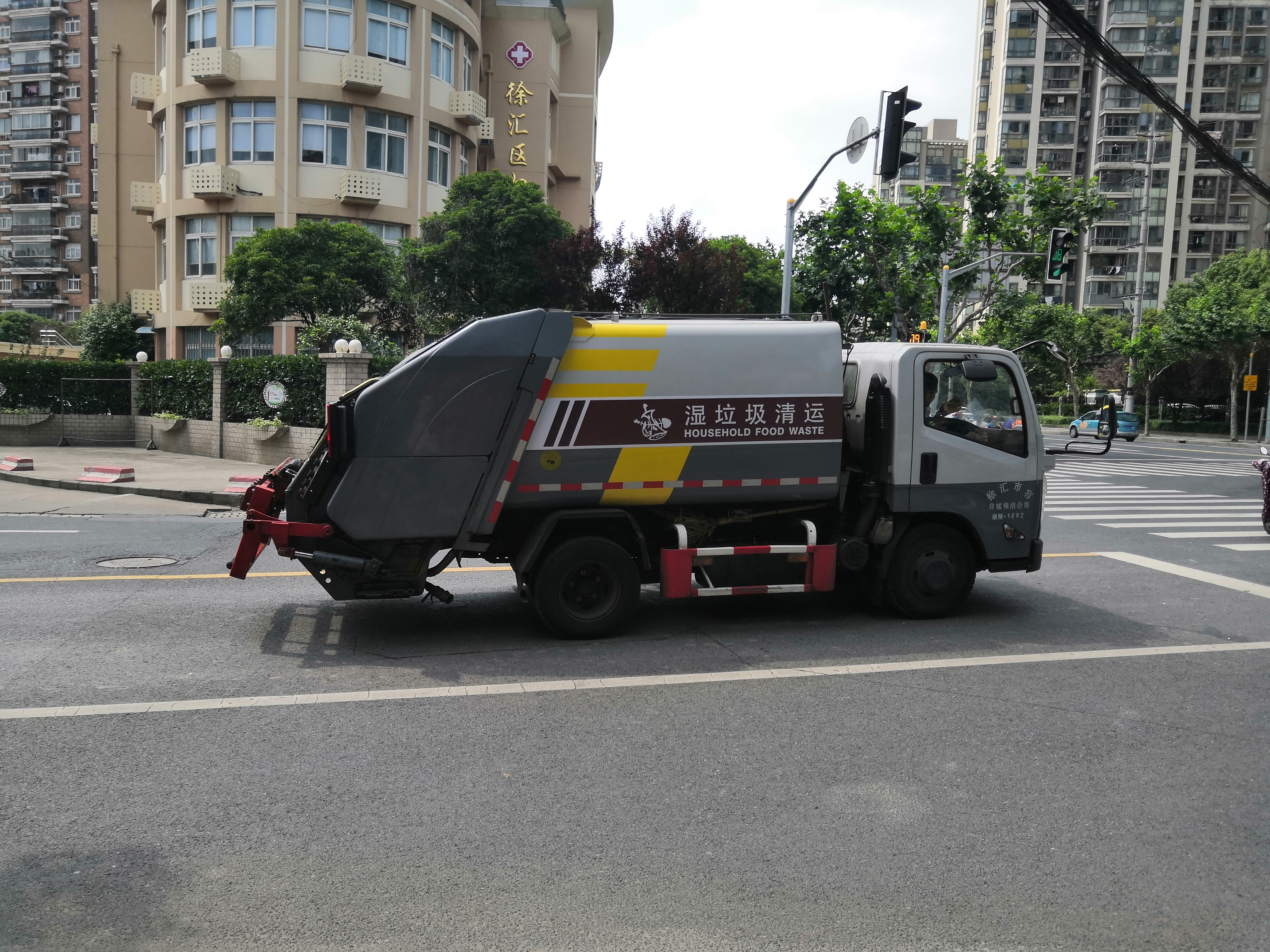 上海市徐汇区浦北路桂林路口，一辆湿垃圾转运车